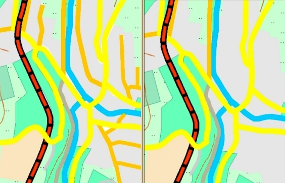 Kartographische Generalisierung: Beispiel für die Auswahl von Objekten für die Darstellung im kleineren Folgemaßstab. Hier: Straßennetz.